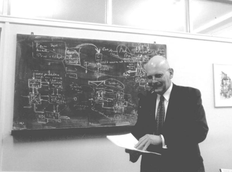 Henk Bikker's systems engineering